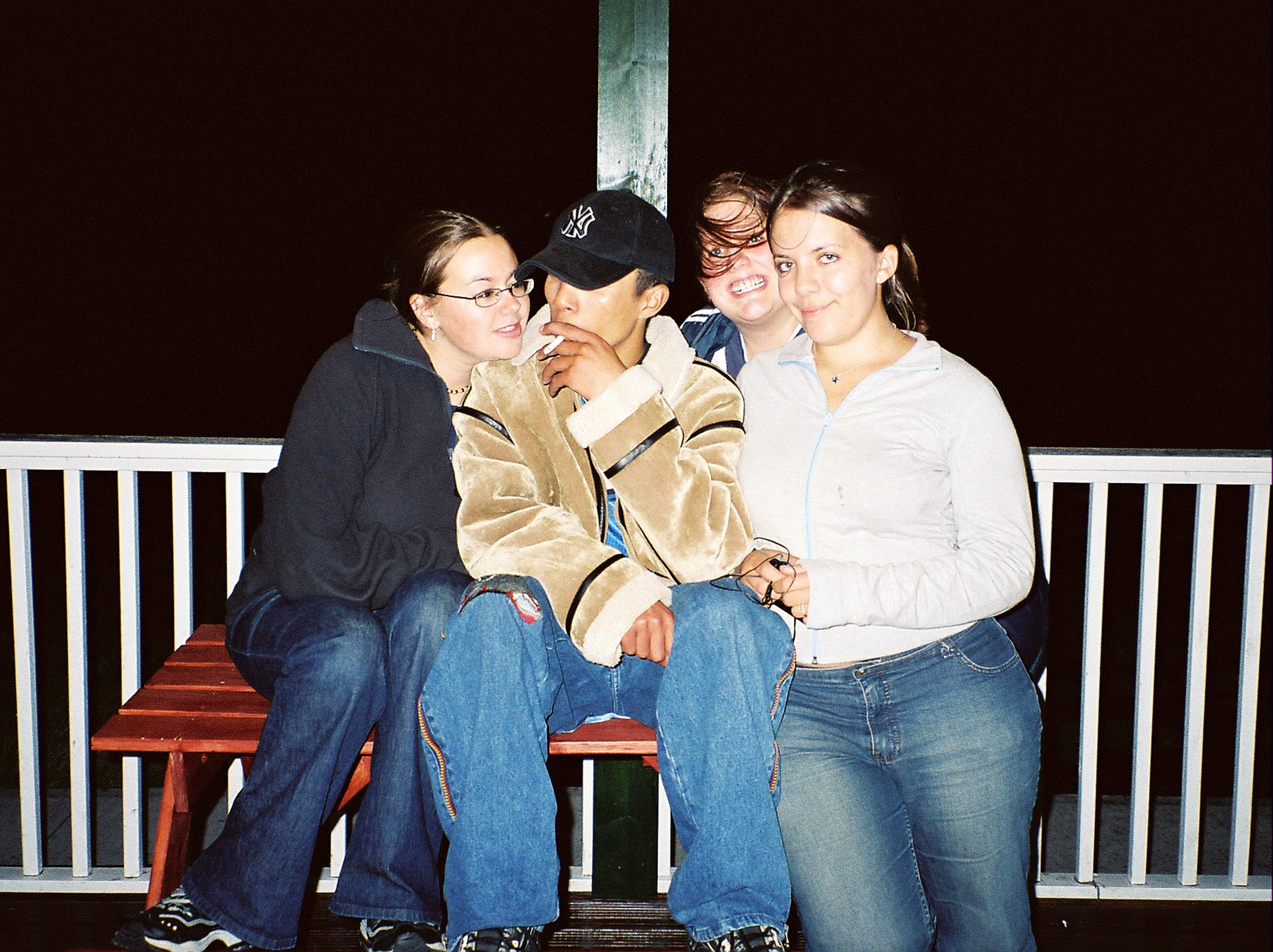 Young Falkland Islanders